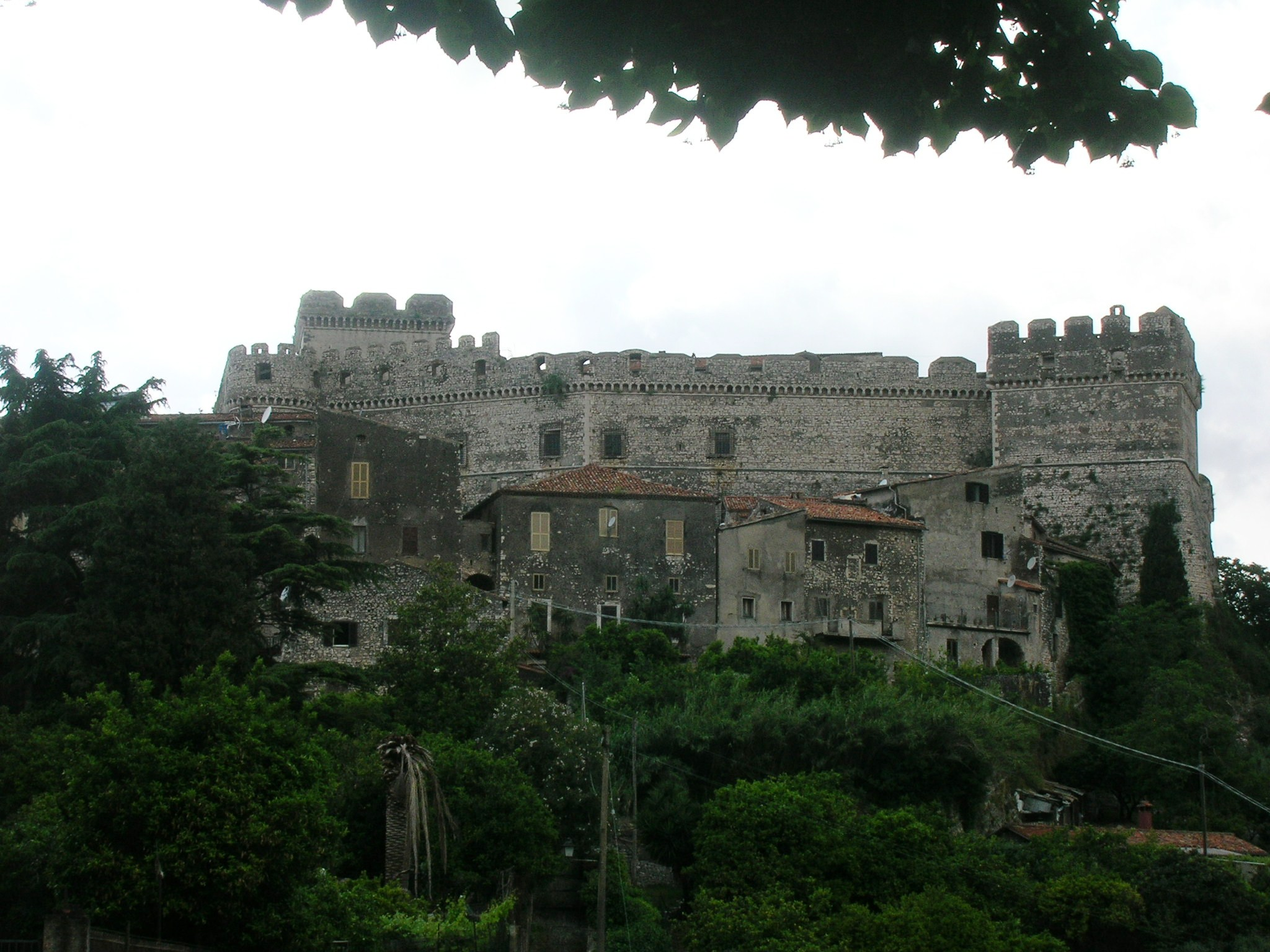 Veduta del castello